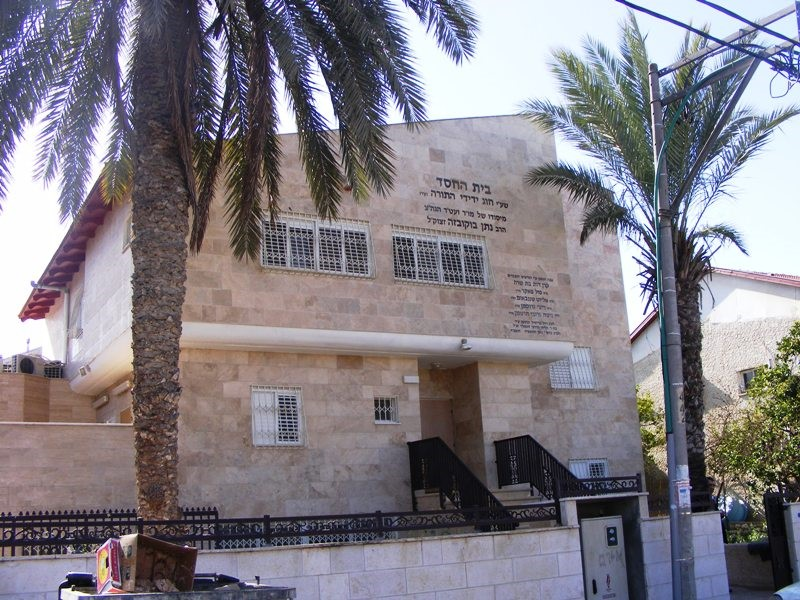 בית החסד שבנה הרב נתן בוקובזה ז"ל, מעט לפני מותו, מול ביתו בנתיבות